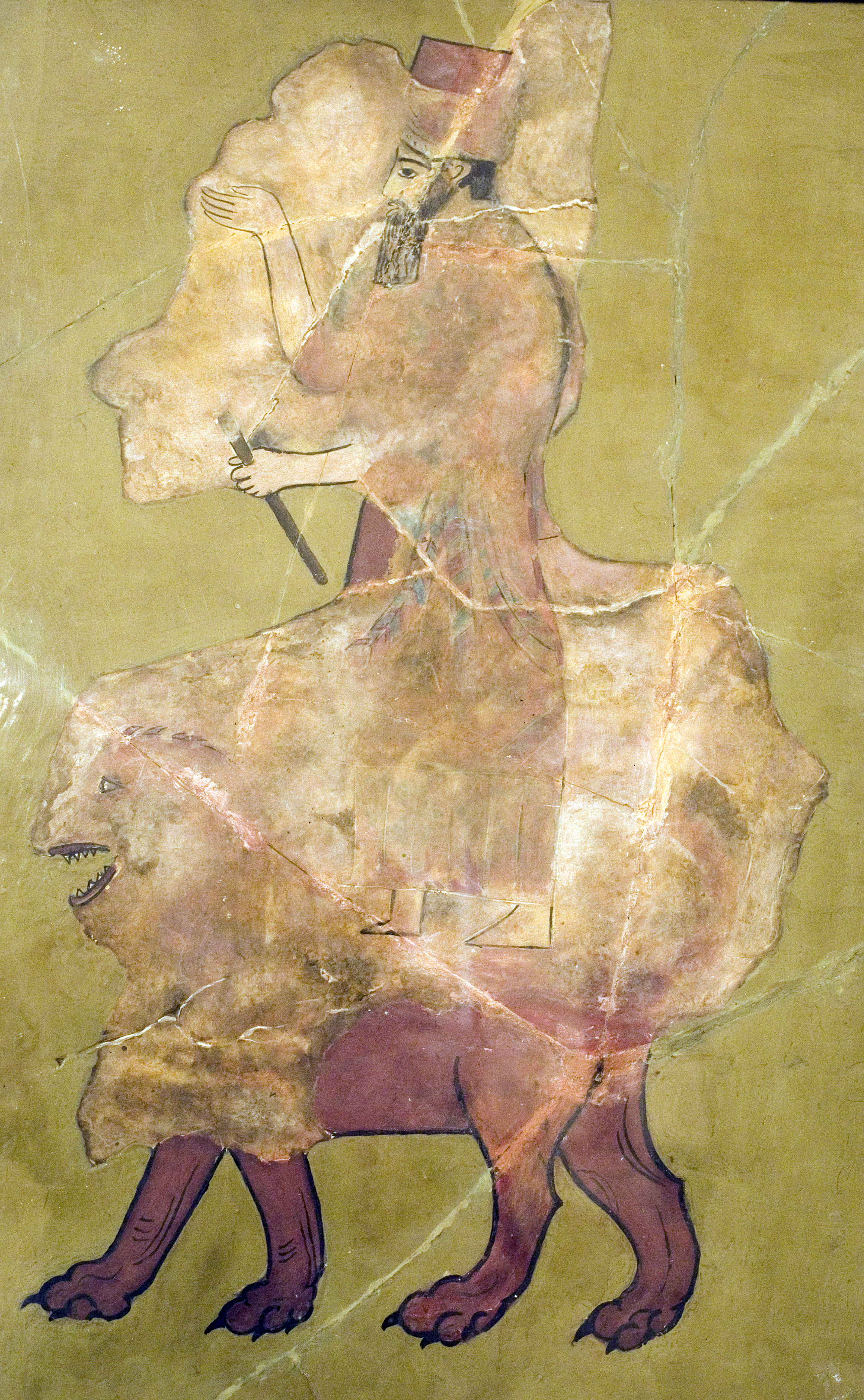 Haldi deity